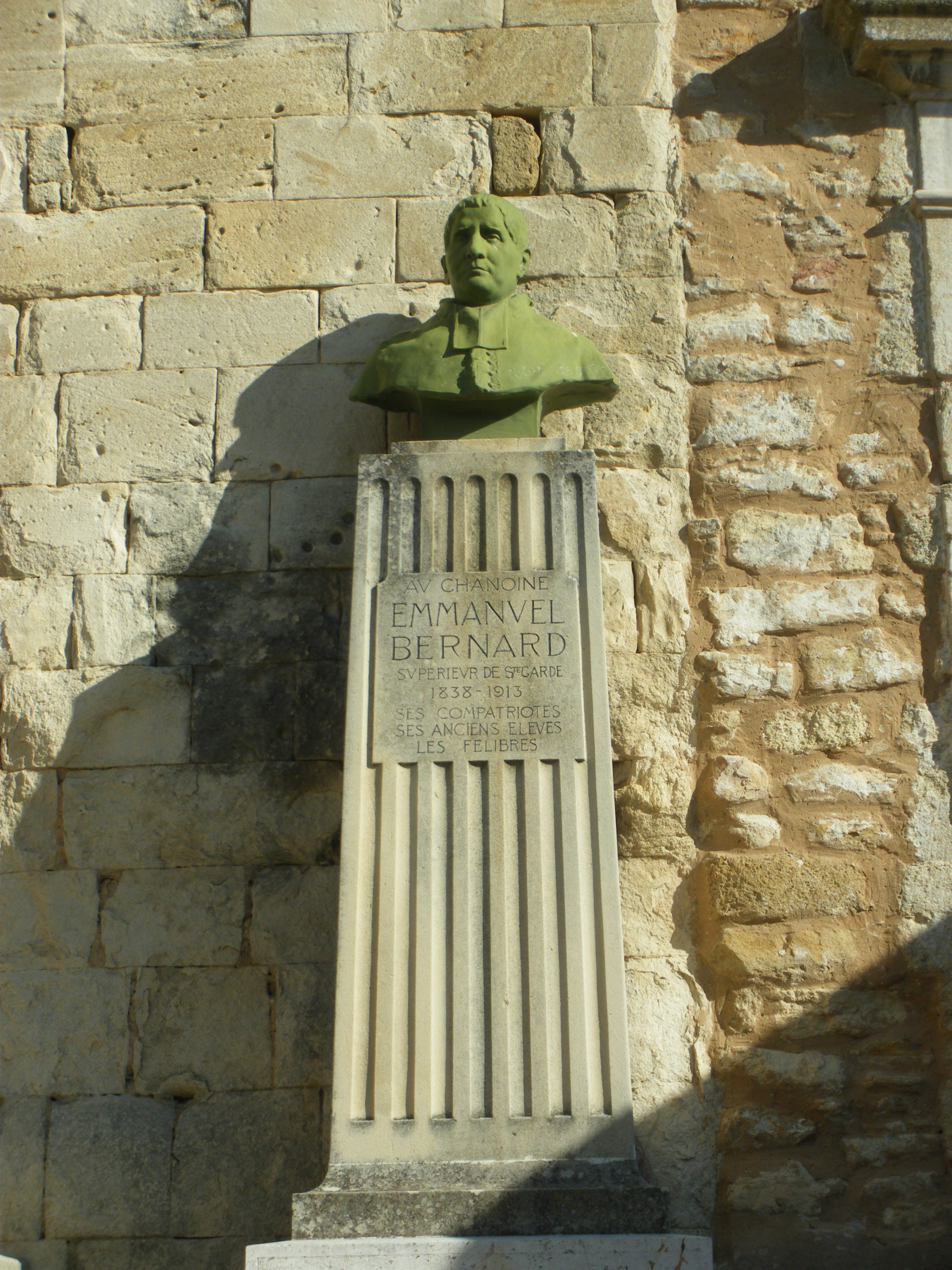 Statue sur la place de l'église de Piolenc, Vaucluse, France